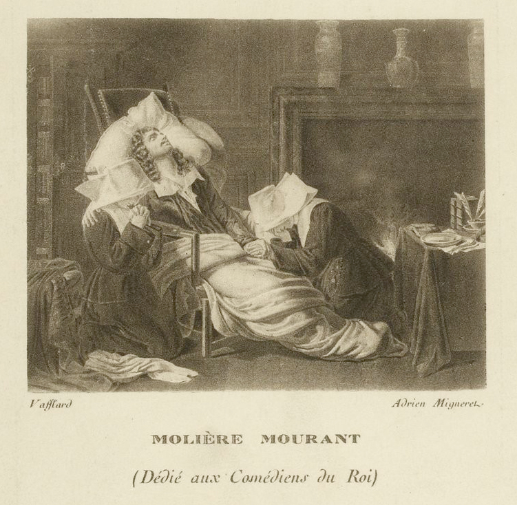 La Mort de Molière - Molière mourant assisté de deux sœurs de la charité